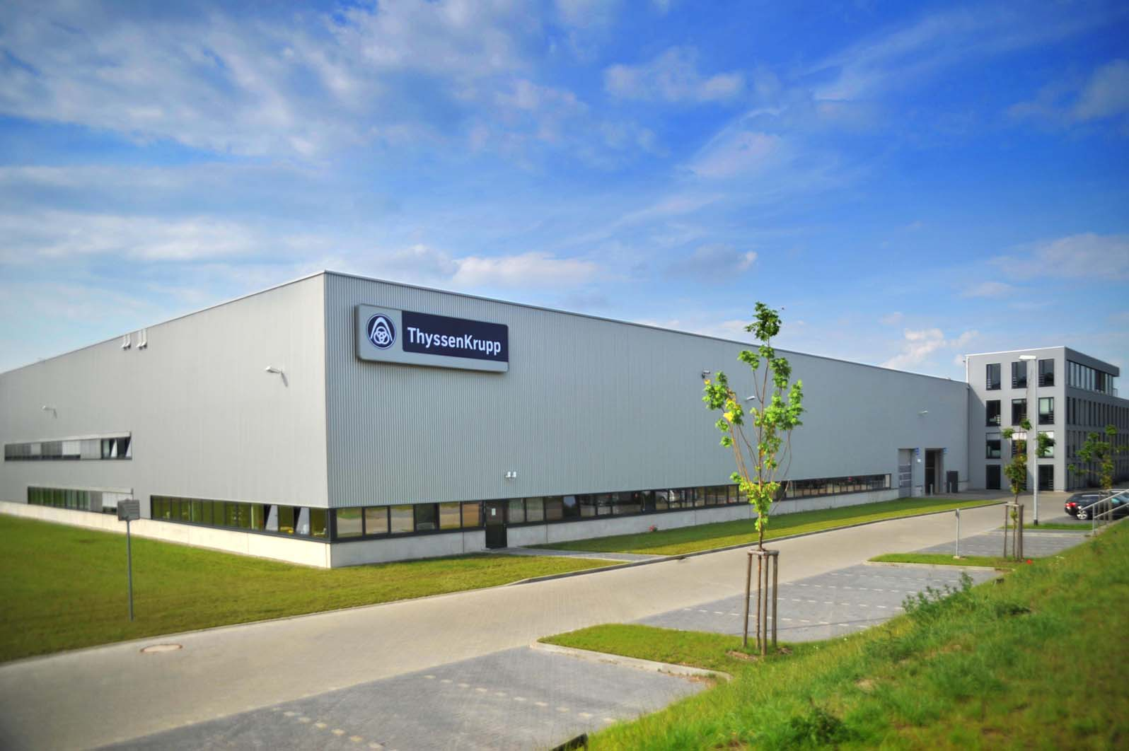 ThyssenKrupp Presta Ilsenburg